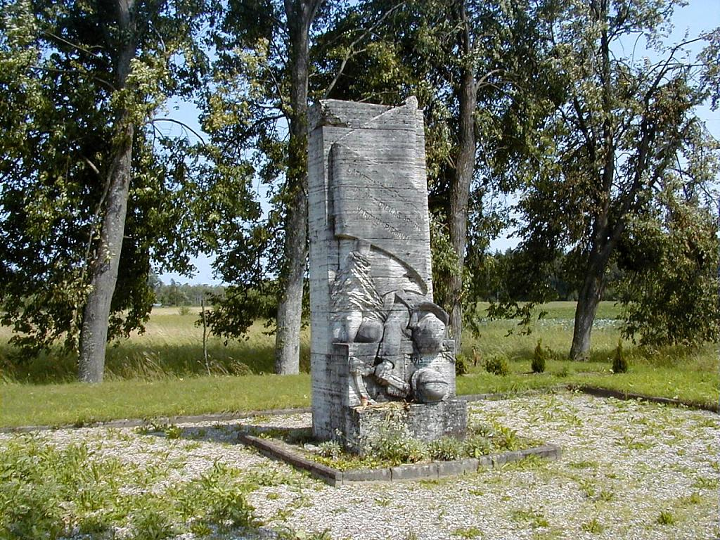 Smārde, 1. pasaules kara piemineklis 2002-07-11